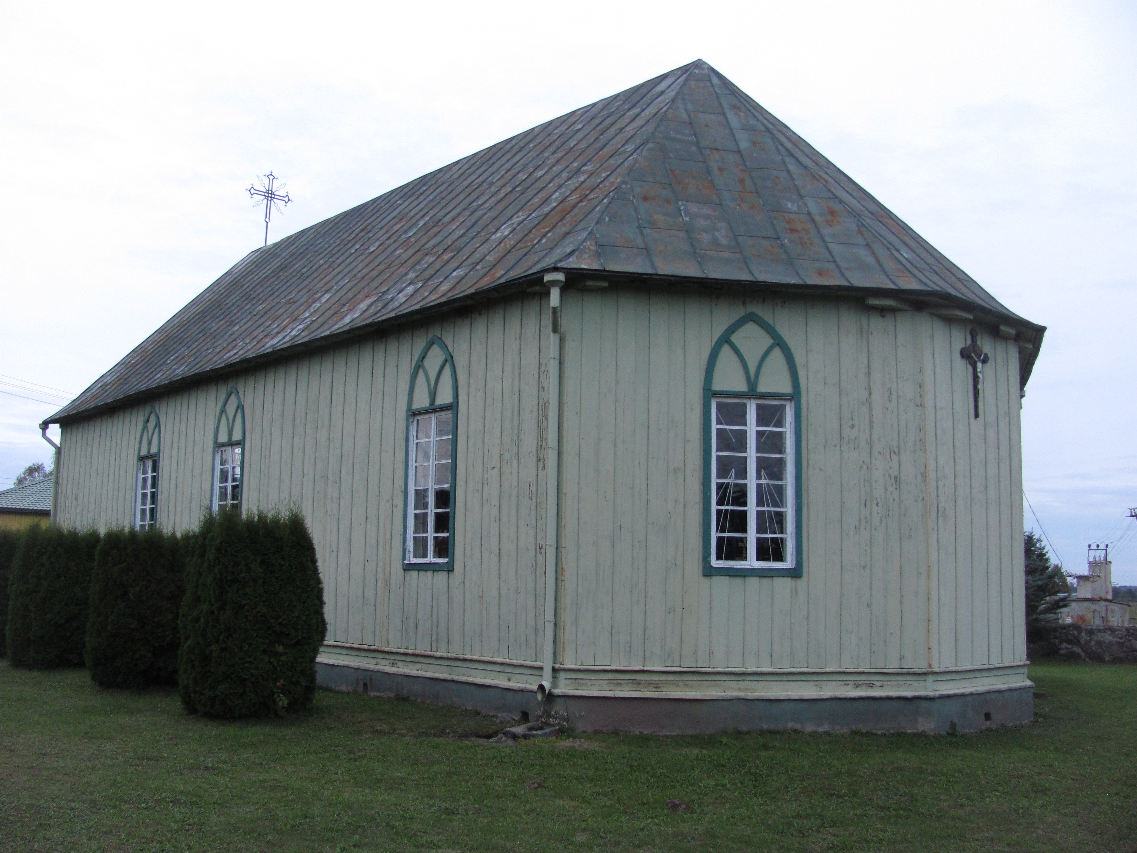 Rageliai, Lithuania